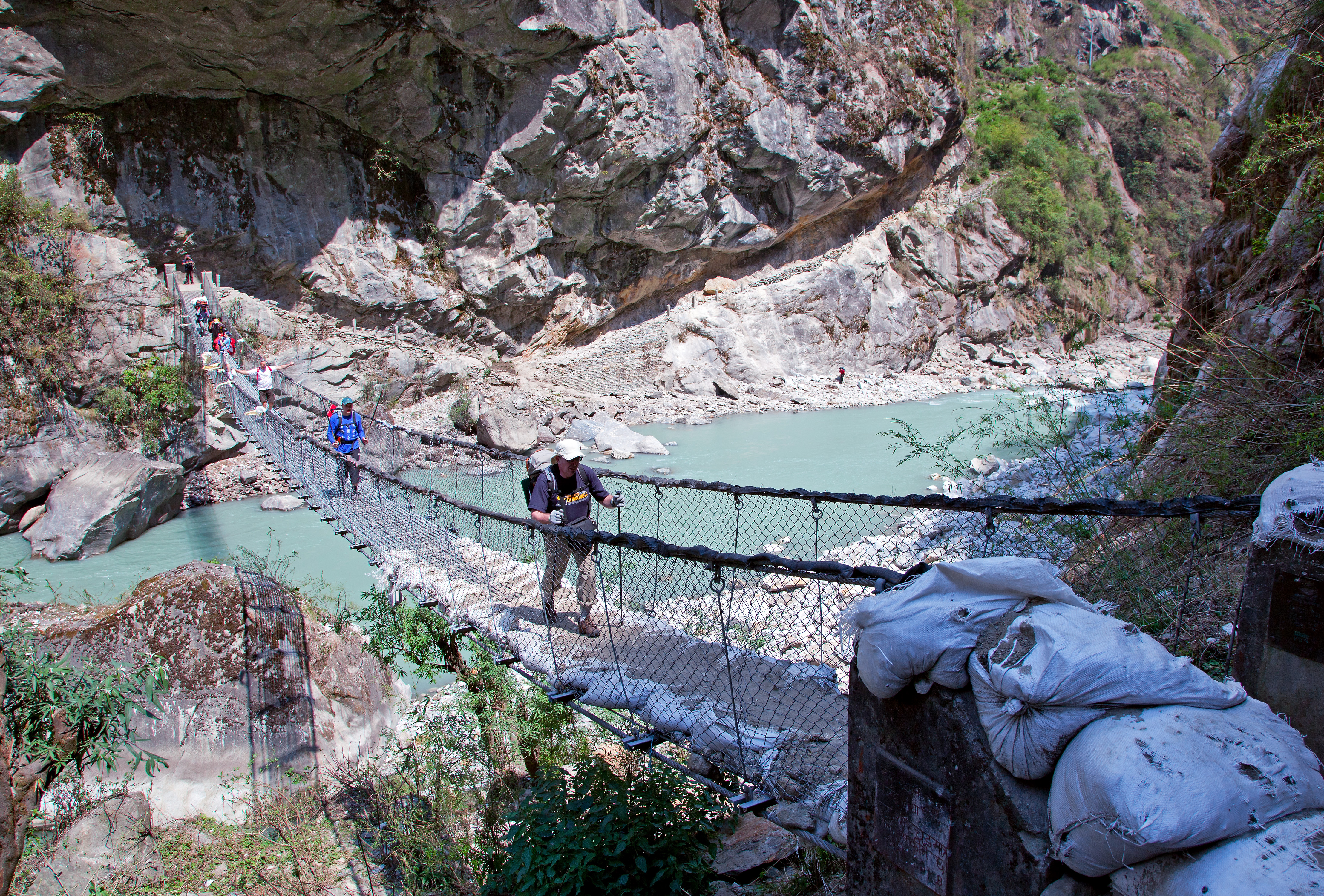 Crossing a hanging bridge / Annapurna Circuit, Nepal